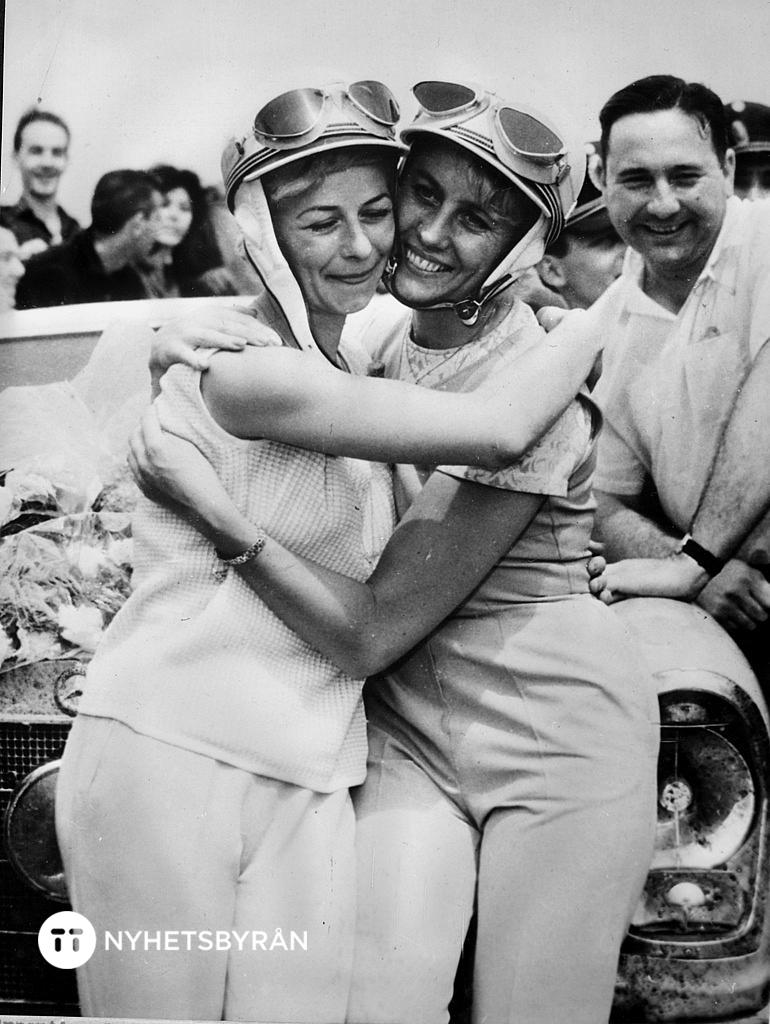 Vinnarna Ewy Rosqvist och Ursula Wirth, Gran Premio Argentina, 1962